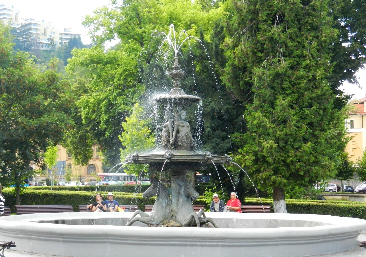 Fântână arteziană (replică)